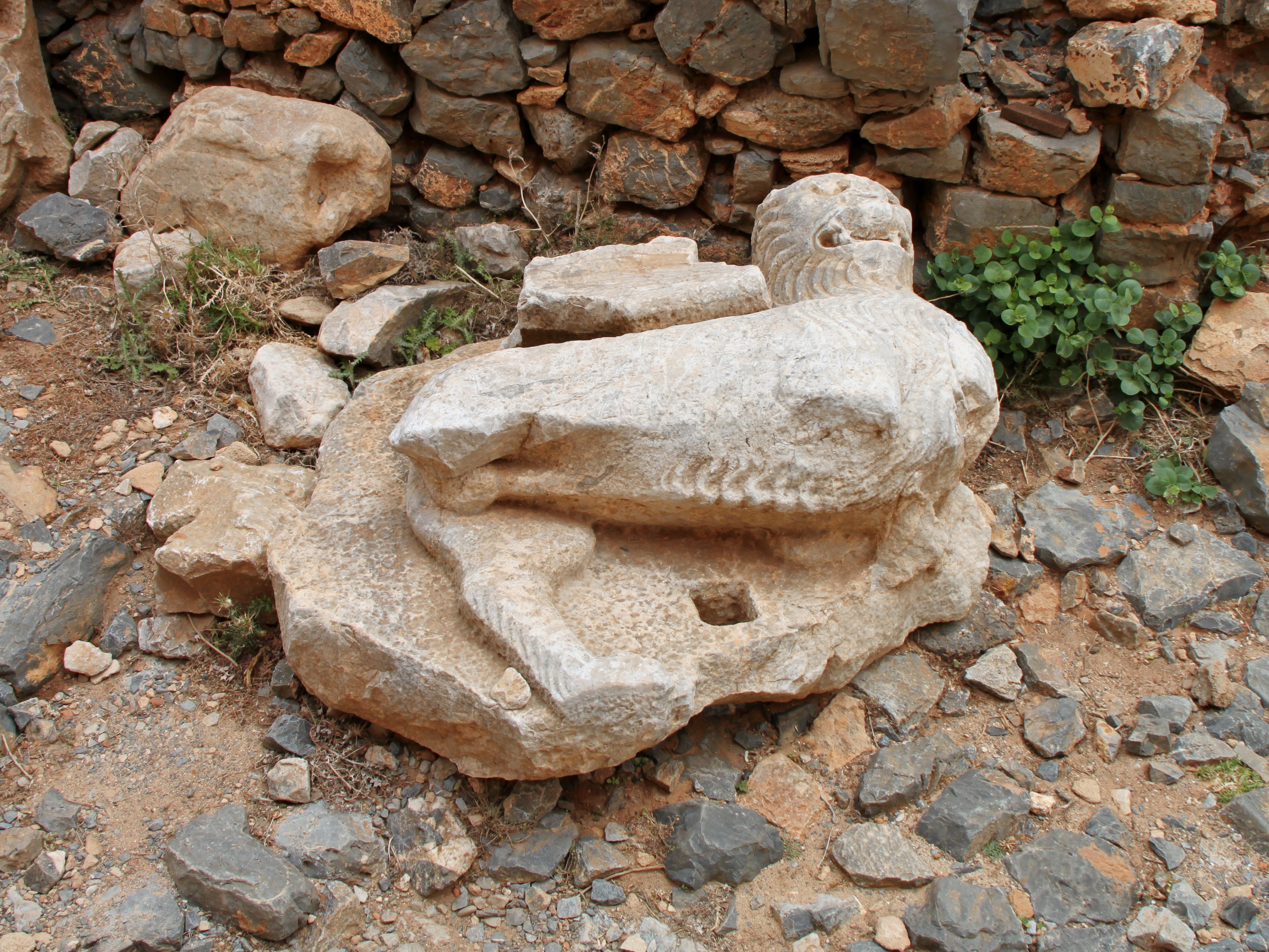 Markuslöwe vor der Festungsruine Kastro Gramvousas (Κάστρο Γραμβούσας) auf Imeri Gramvousa (Ήμερη Γραμβούσα), Insel in der Gemeinde Kissamos, Regionalbezirk Chania, Kreta, Griechenland